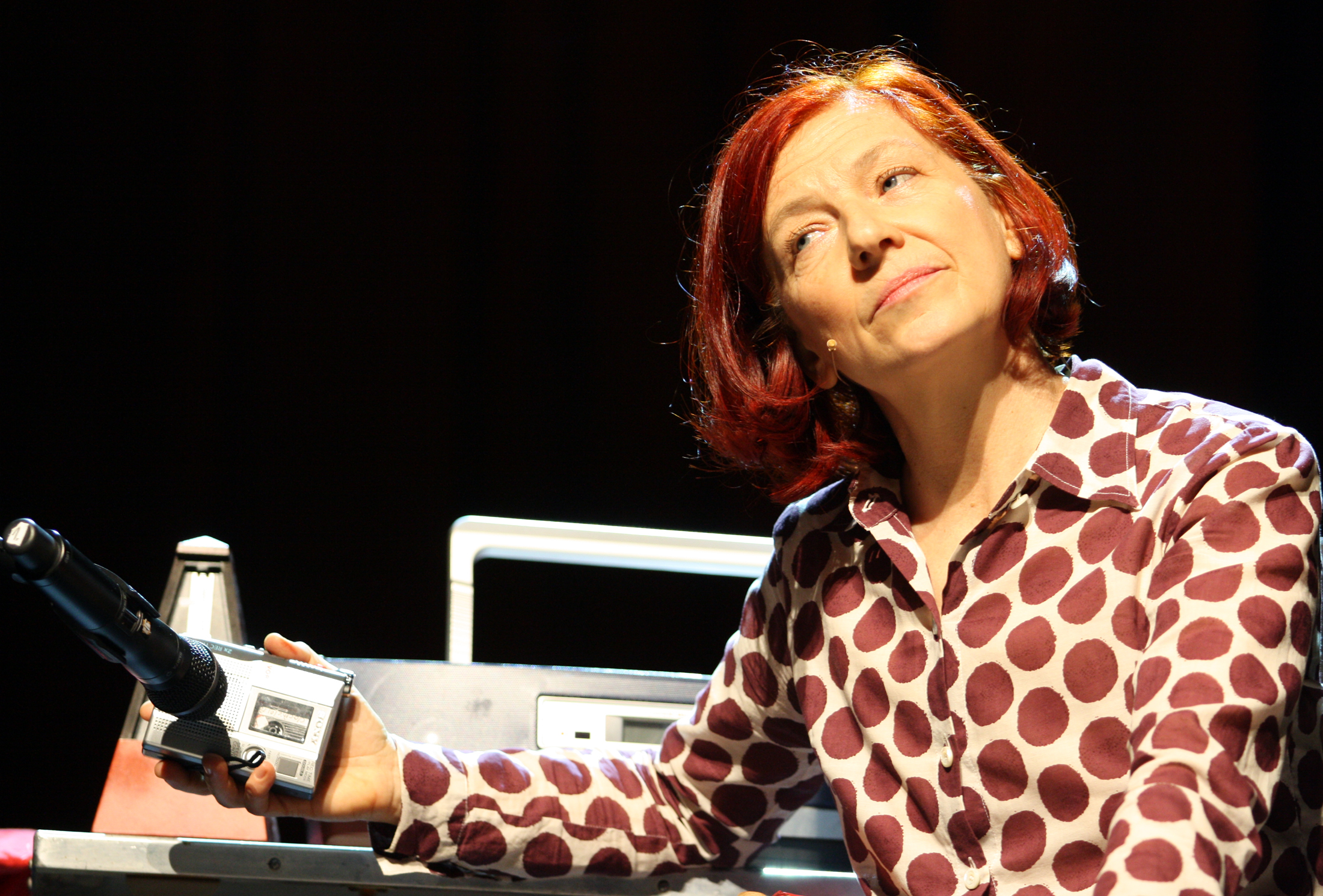 Clara Buntin, deutschsprachige Musikerin und Schauspielerin (lebt in Zürich). Hier während ihres Aufritts am 24.01.2012 auf der Freiburger Kulturbörse, Theatersaal 1. (Aus dem Programm "Ich und Clara", Original und Kopie: Die echte Clara Buntin lauscht Ihrer Kopie vom Walkman.)